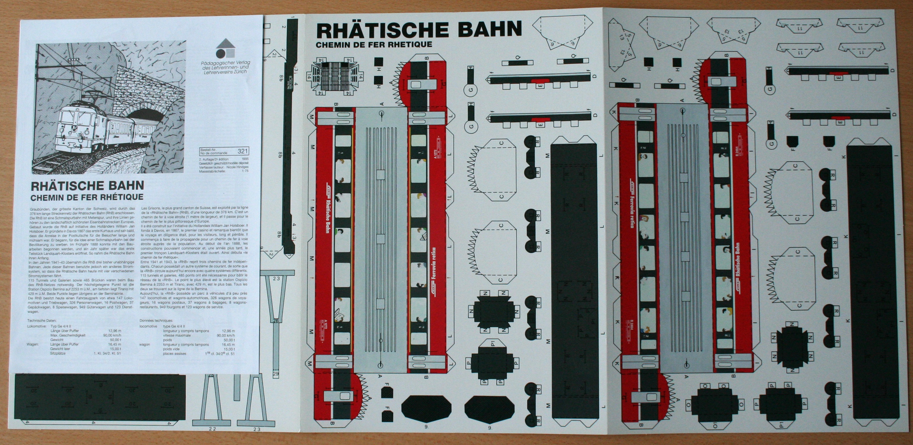 Kartonmodellbogen der Rhätischen Bahn, Herausgeber Pädagogischer Verlag des Lehrerinnen- und Lehrervereins Zürich